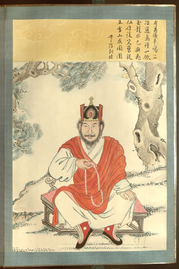 牟保阿琮，丽江土司。